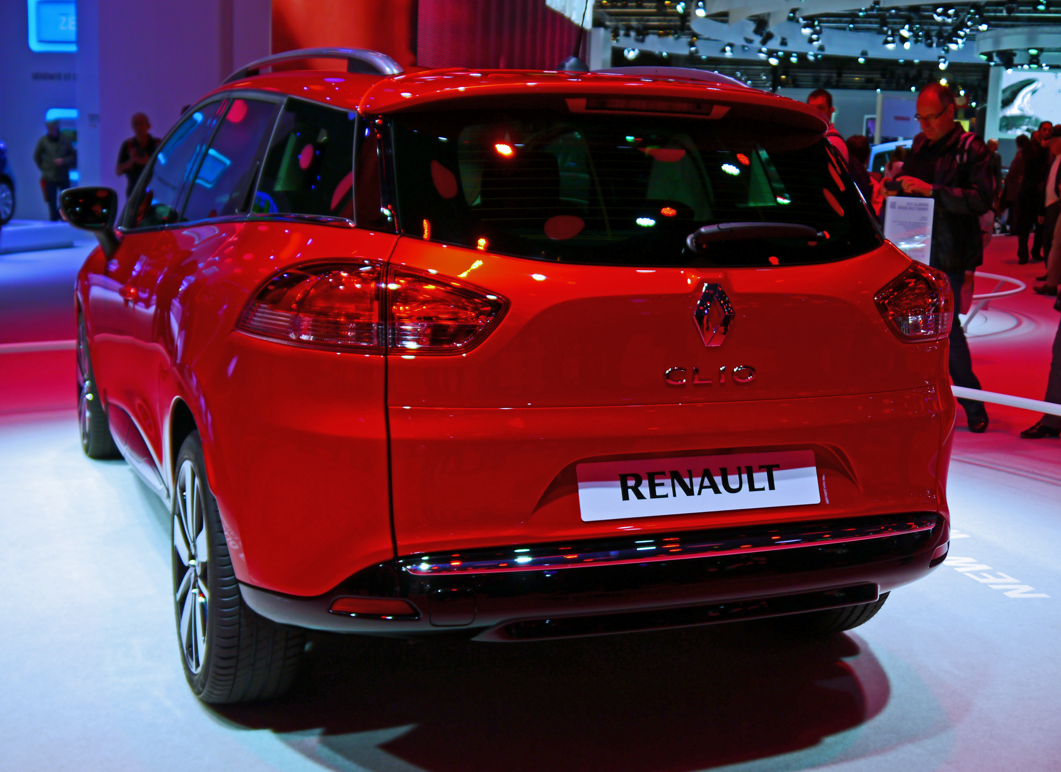 Renault Clio IV Estate - World Premiere.